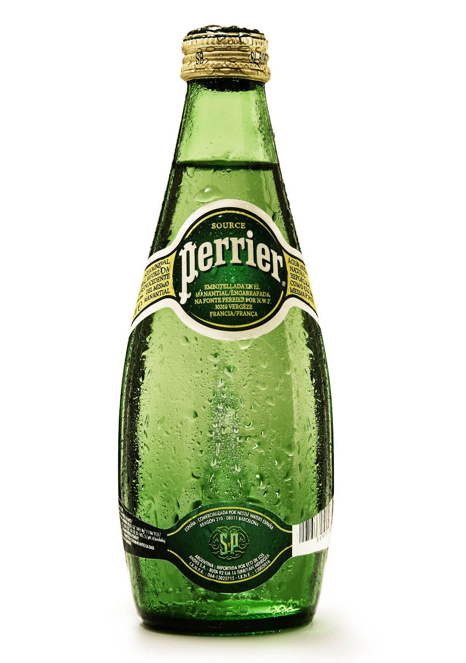 Perrier